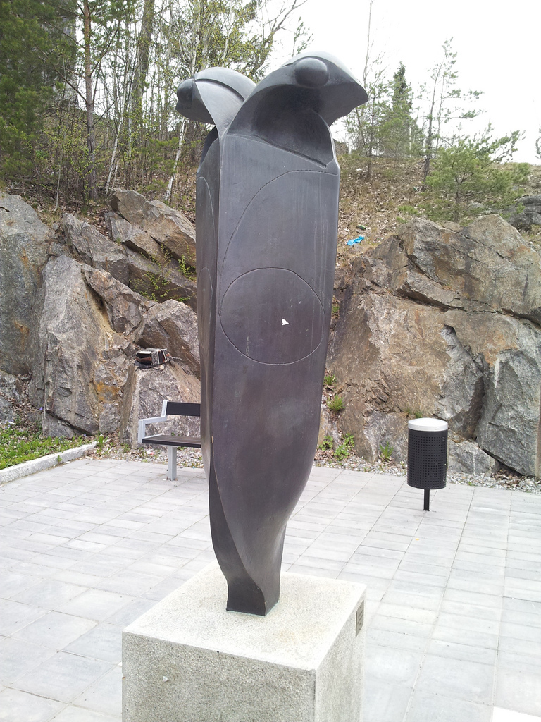 Dubbelbagge av Sam Westerholm (1988), på vägen mellan Flemingsbergs station och Södertörns högskola/Huddinge sjukhus.